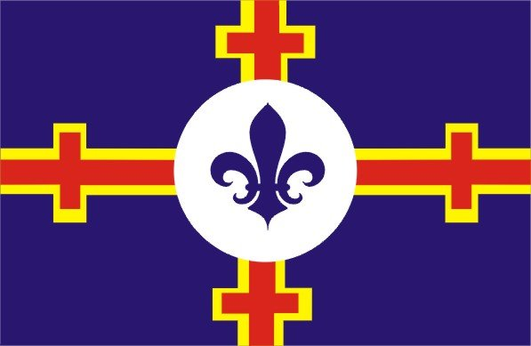 Bandeira de Cruzeta, estado do Rio Grande do Norte.